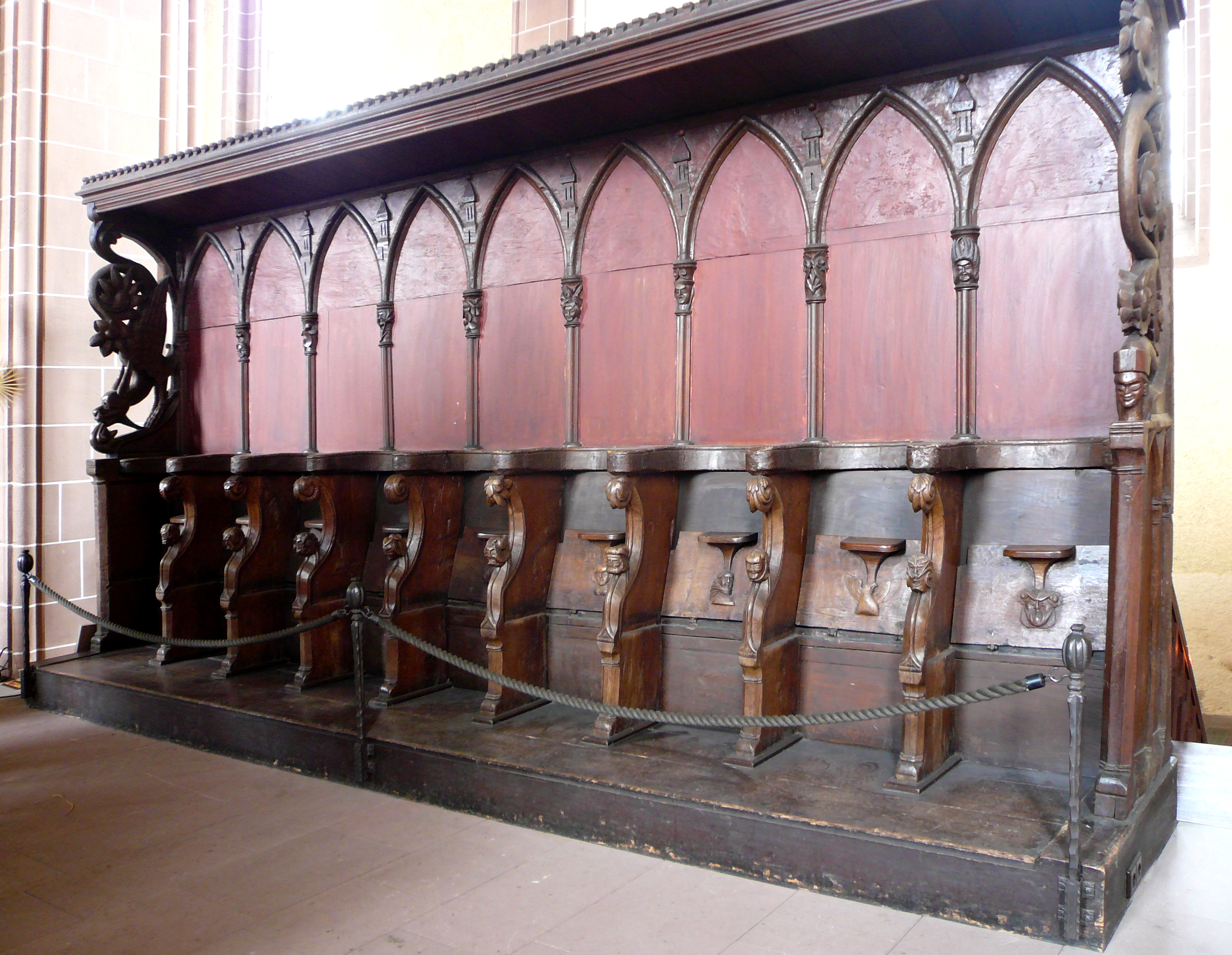 Gotisches Chorgestühl von 1288 in der Münsterkirche St. Alexandri in Einbeck, Niedersachsen.